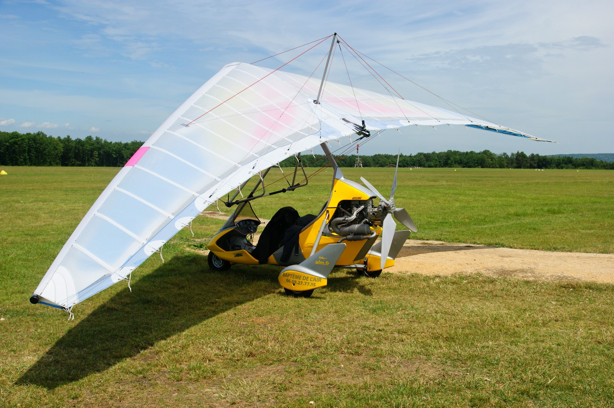 Aile volante motorisée vue à La Ferté Alais